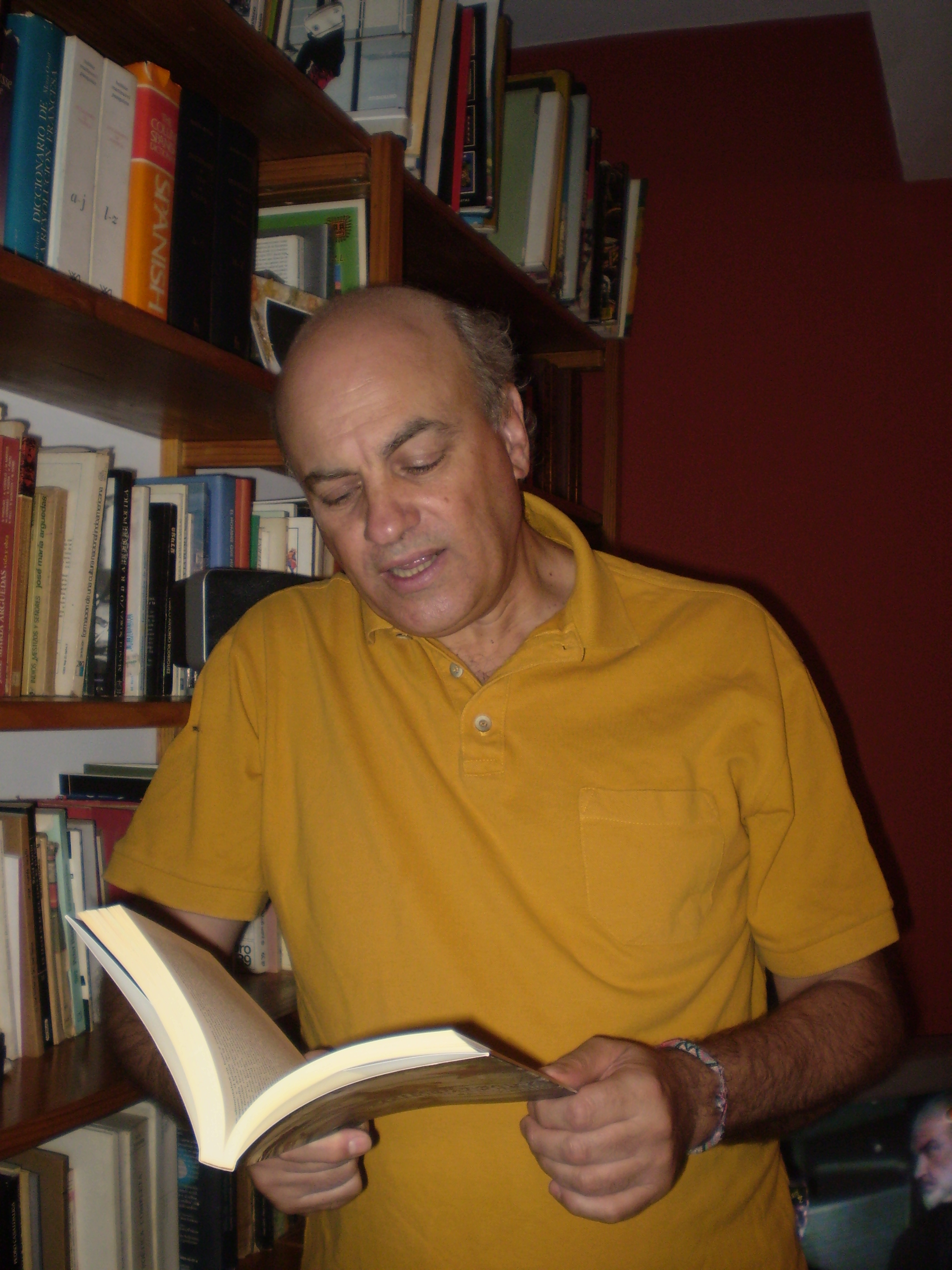 Raúl Zibechi pensador-activista. Periodista uruguayo